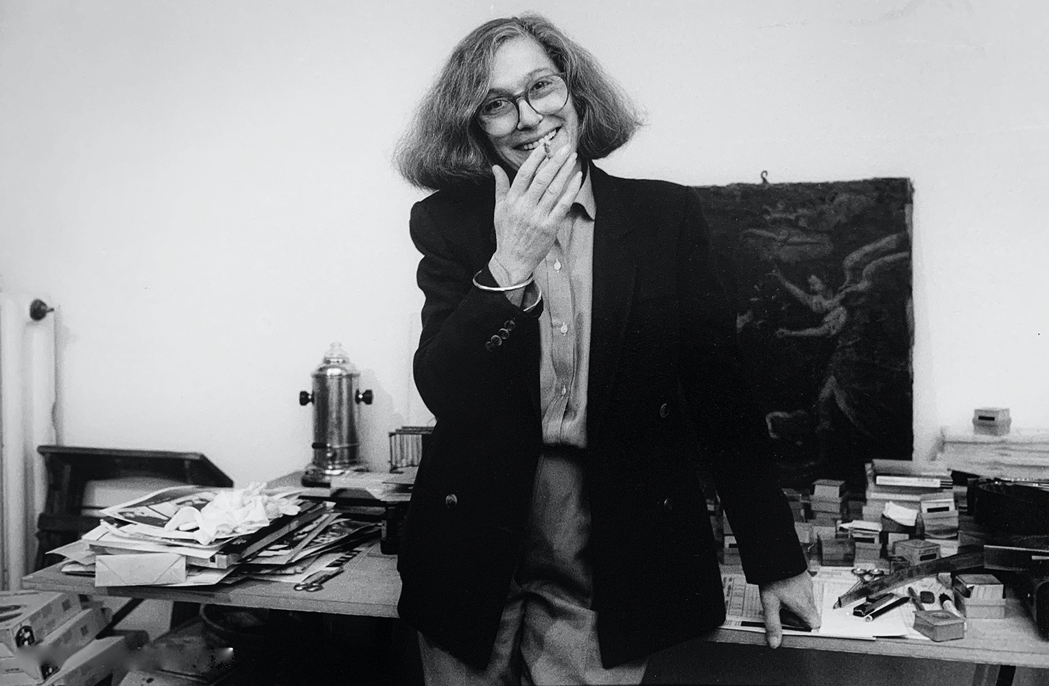 Die Fotografin und Fotokünstlerin Abisag Tüllmann 1990 in Frankfurt am Main